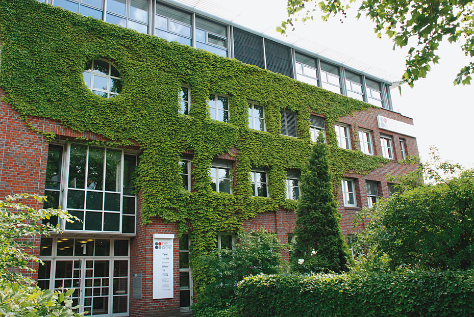 Verlagsgebäude FVW Mediengruppe in Hamburg